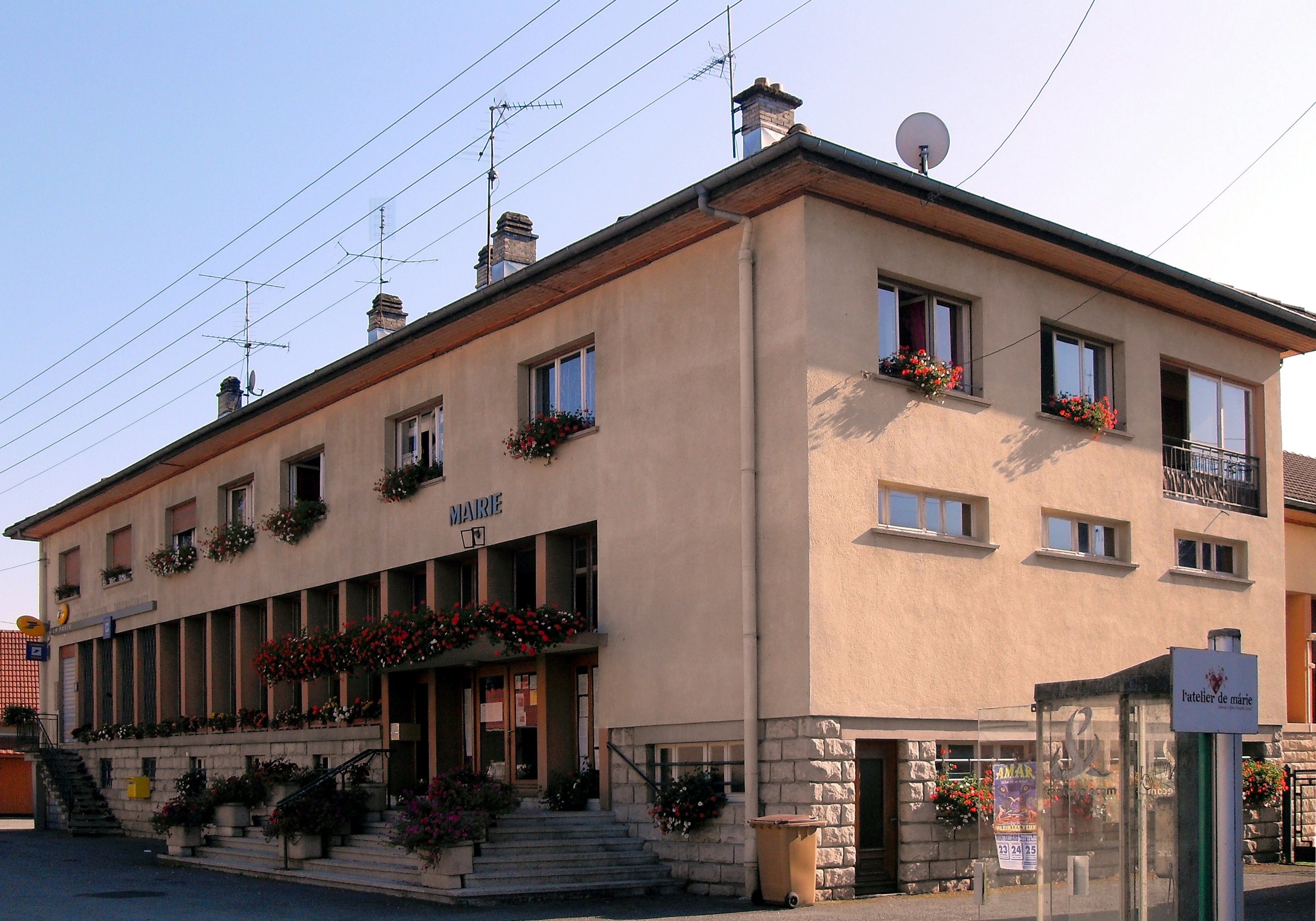 La mairie et la poste de Morvillars